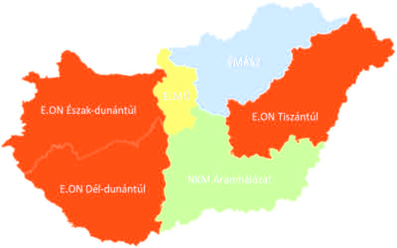 DSO területi határok, tulajdonosi körök